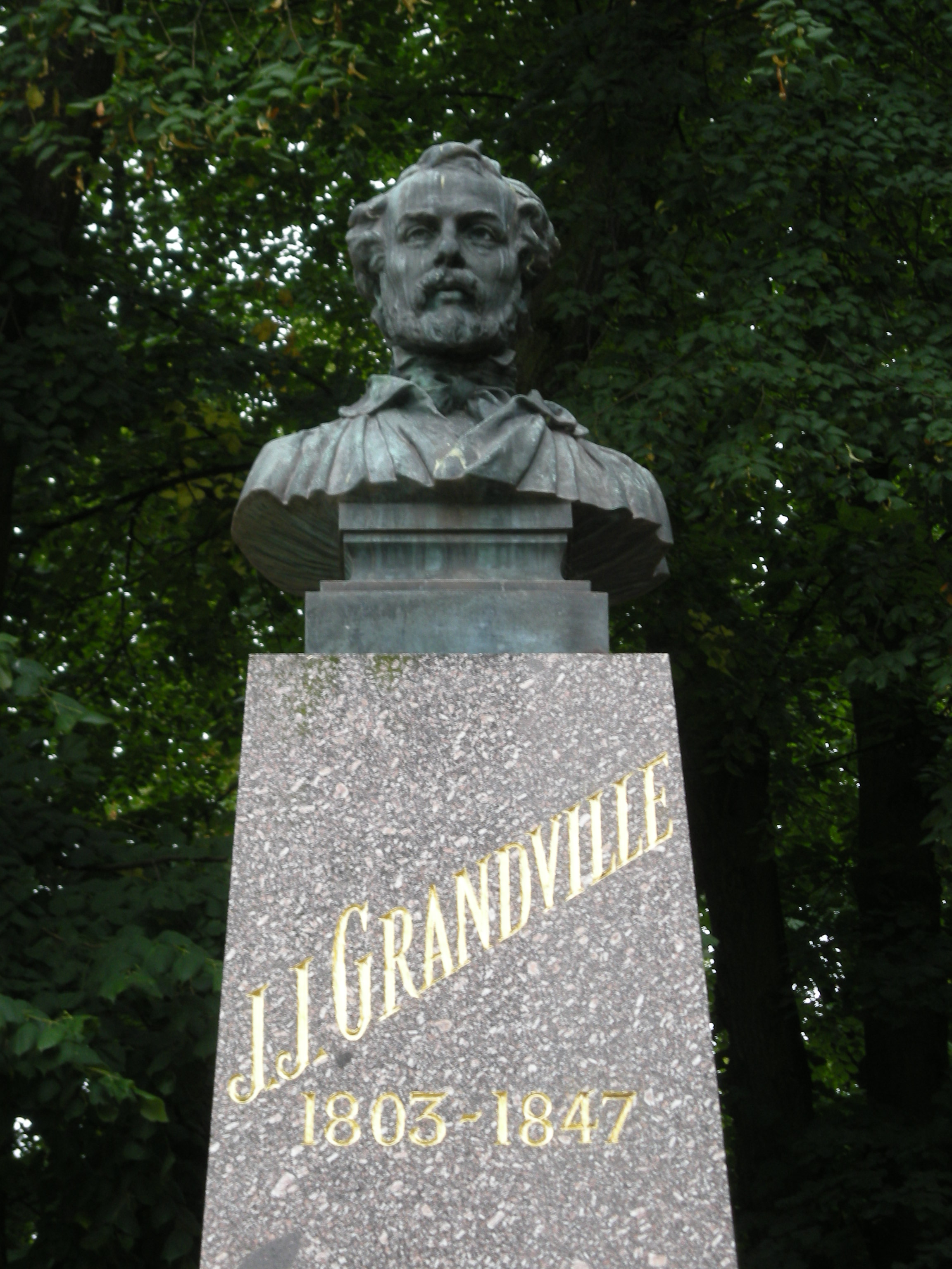 Buste de l'illustrateur Jean-Jacques Grandville par Ernest Bussière (né à Ars-sur-Moselle en 1863 - mort à Nancy en 1913, statuaire et céramiste de l'École de Nancy), dans le Parc de la Pépinière à Nancy